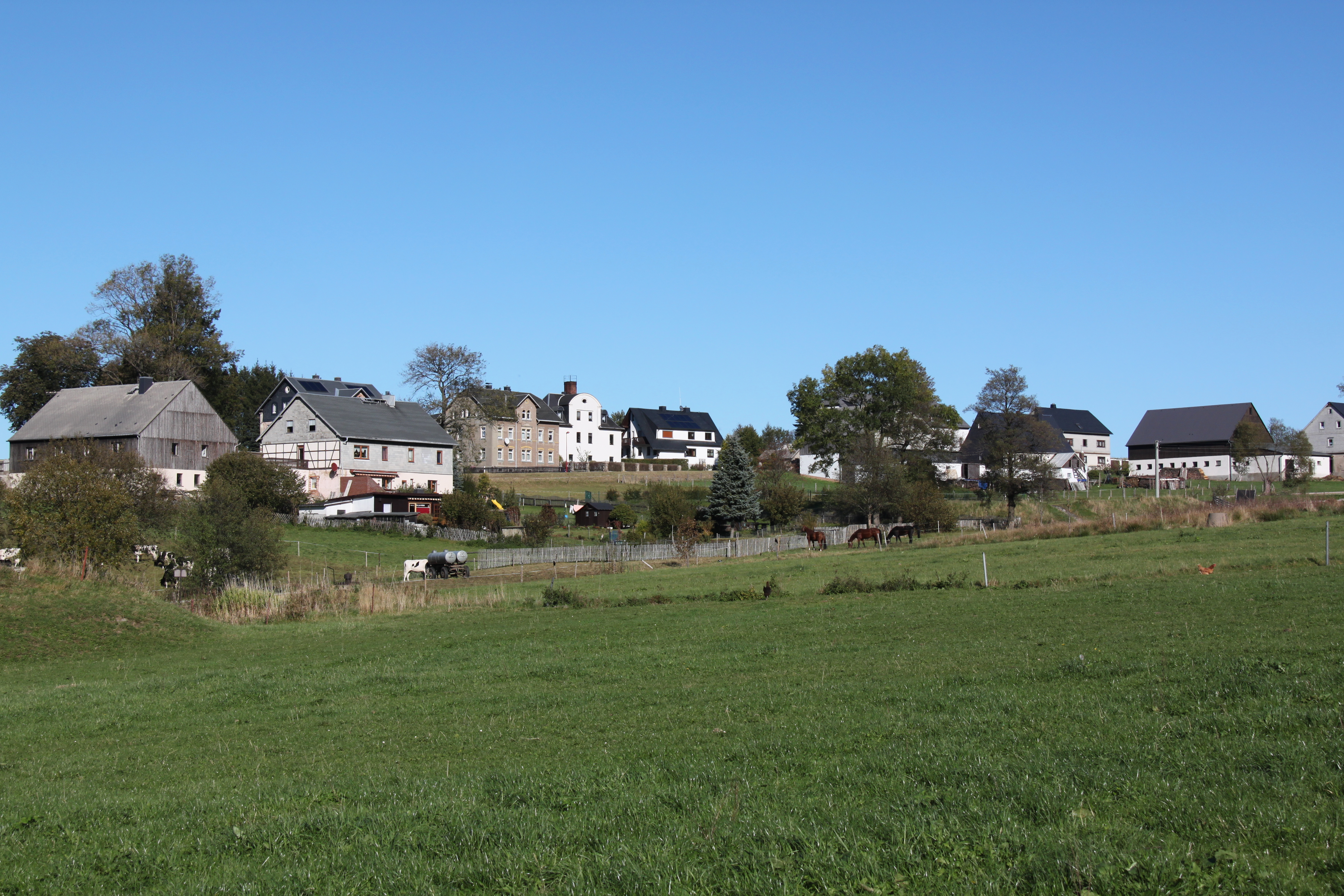 in Günsdorf